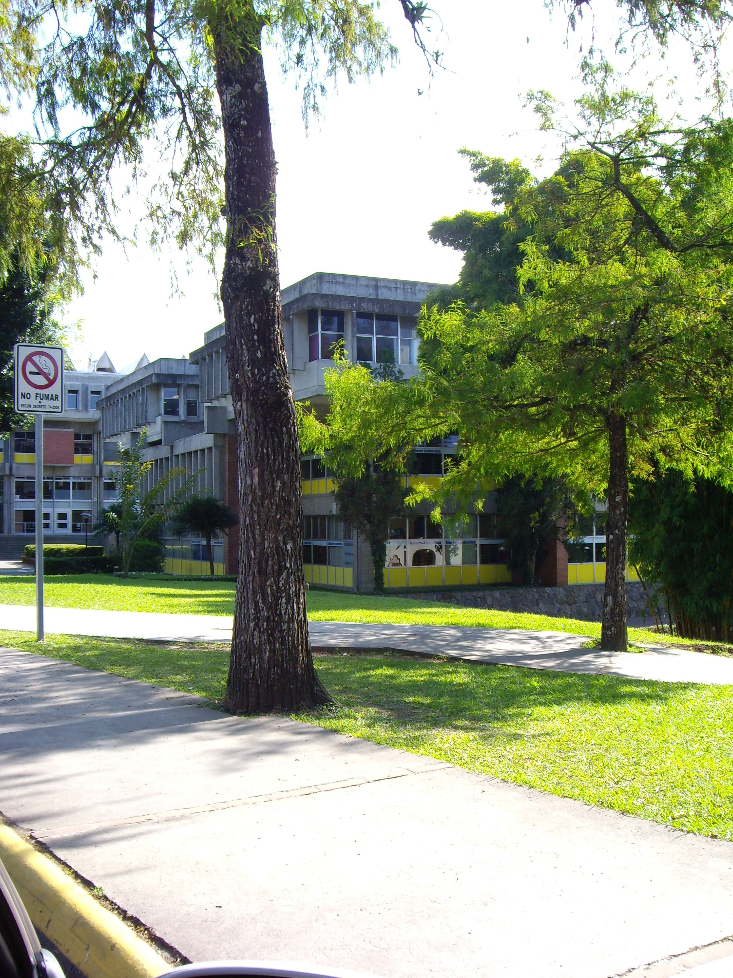 Edificios Universidad Rafael Landivar, Ciudad Guatemala